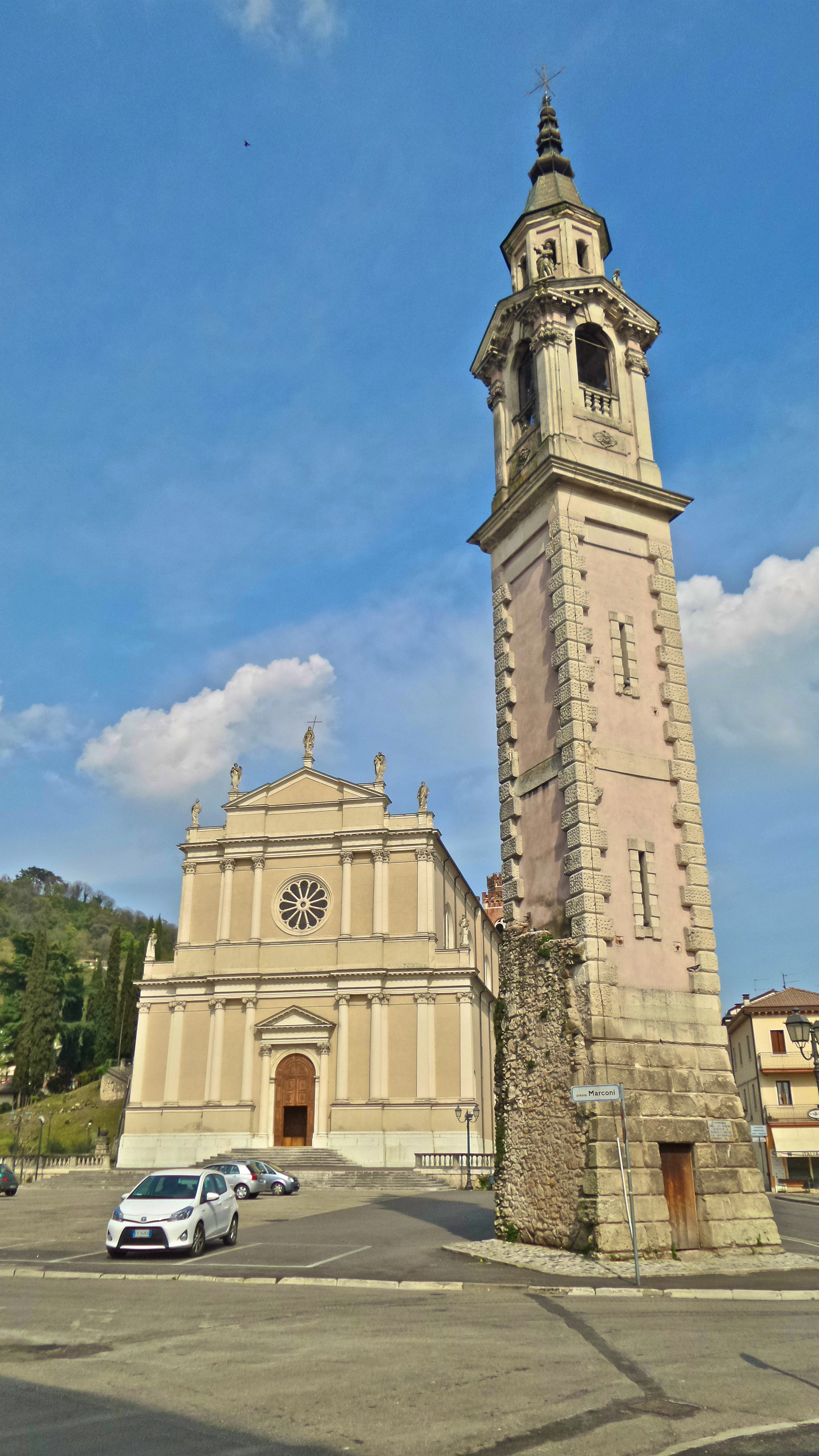 In primo piano, il vecchio campanile di Castelgomberto; sullo sfondo, il duomo dei santi Pietro e Paolo